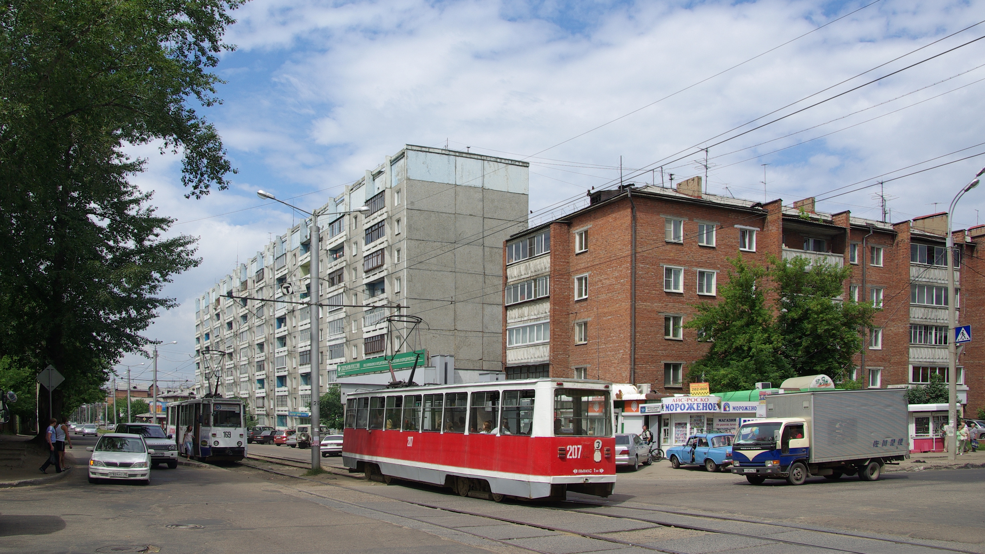 Иркутский трамвай